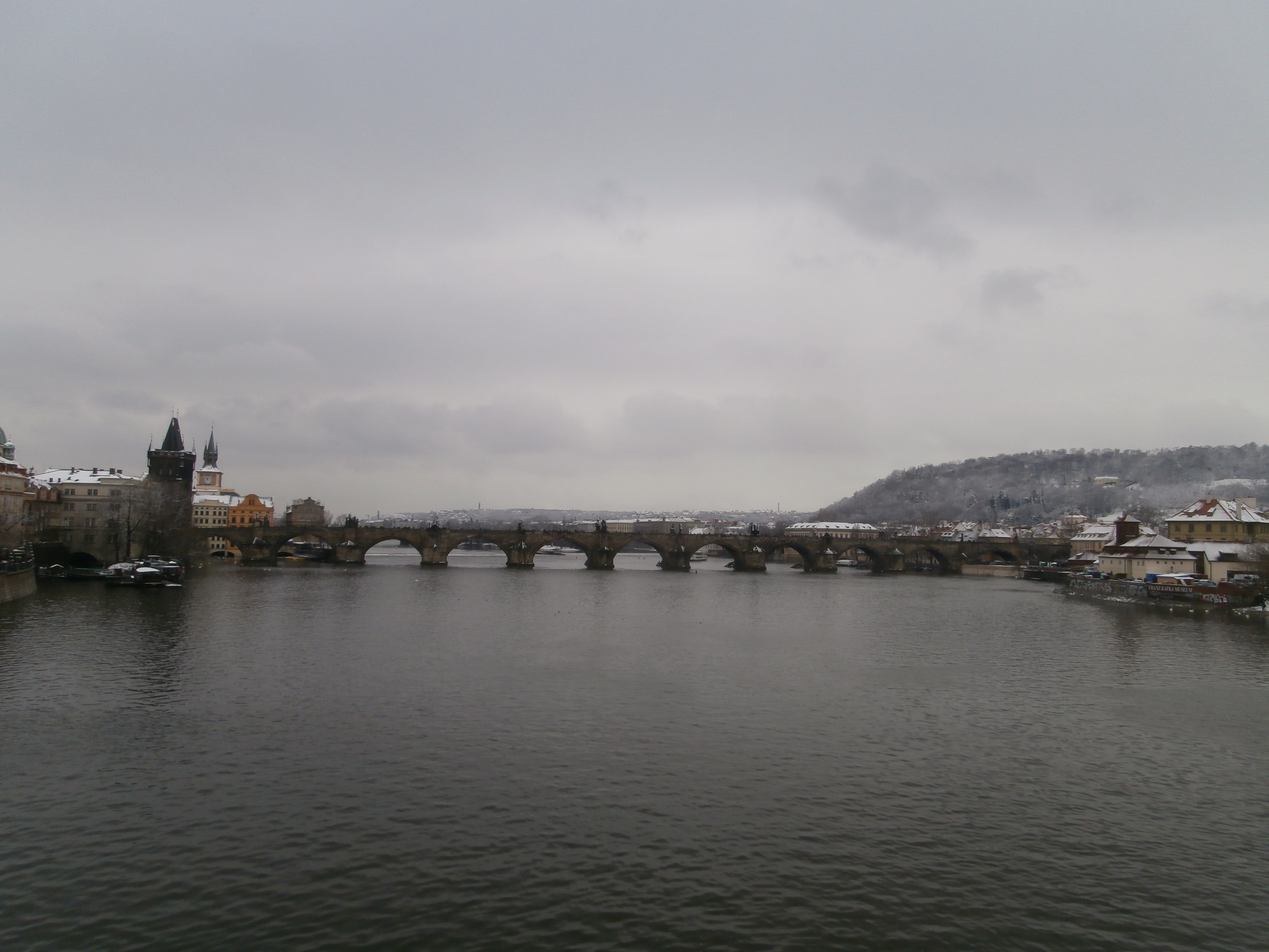 Řeka Vltava a Karlův most v zimě, 1. 3. 2016